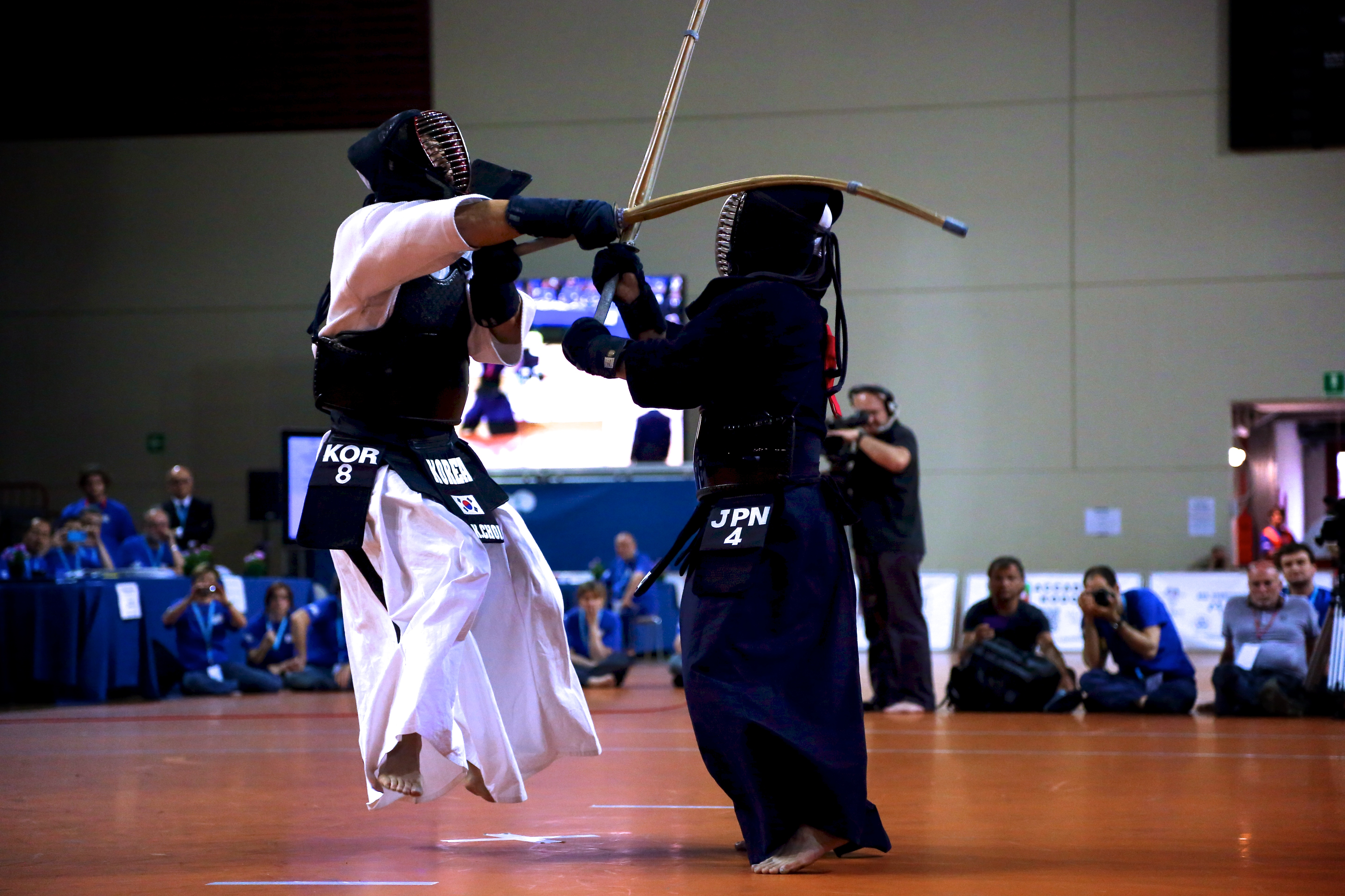 2012世界剣道選手権大会 [1] 次鋒 △勝見（コ 引分け メ）韓国△